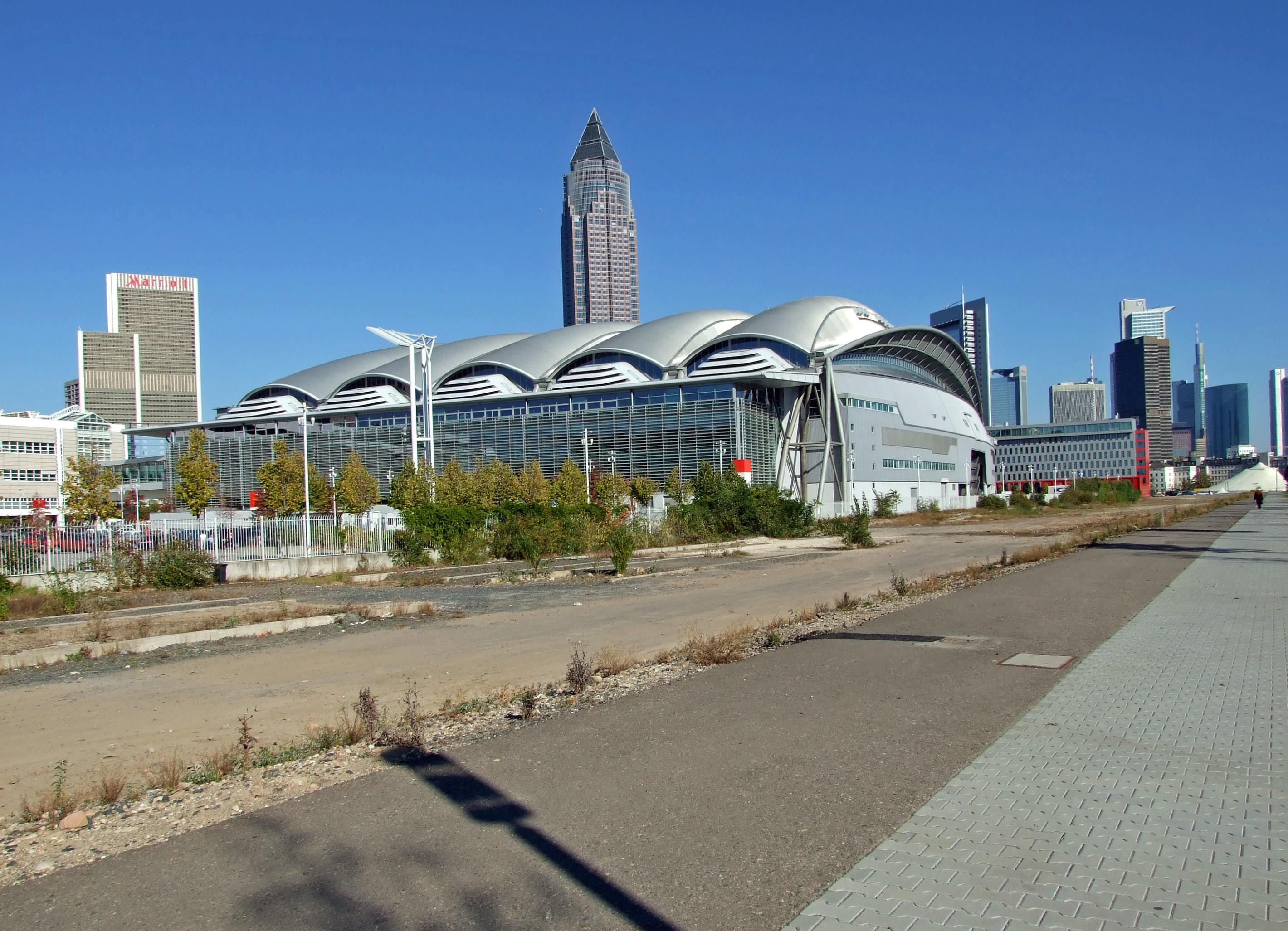 "Halle 3" auf dem Messegelände in Ffm, von Europa-Allee (Sued-West) gesehen